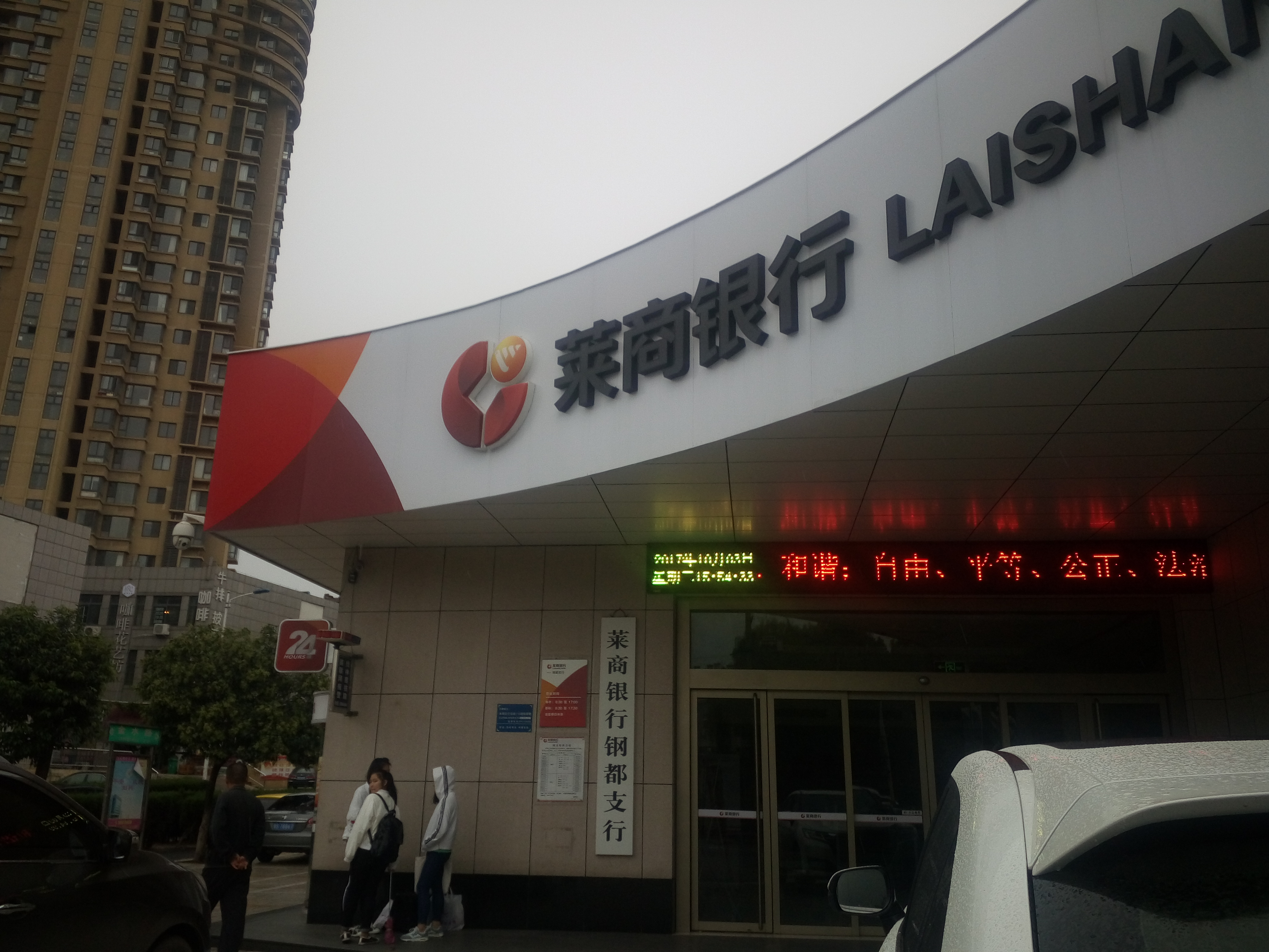 莱商银行某支行